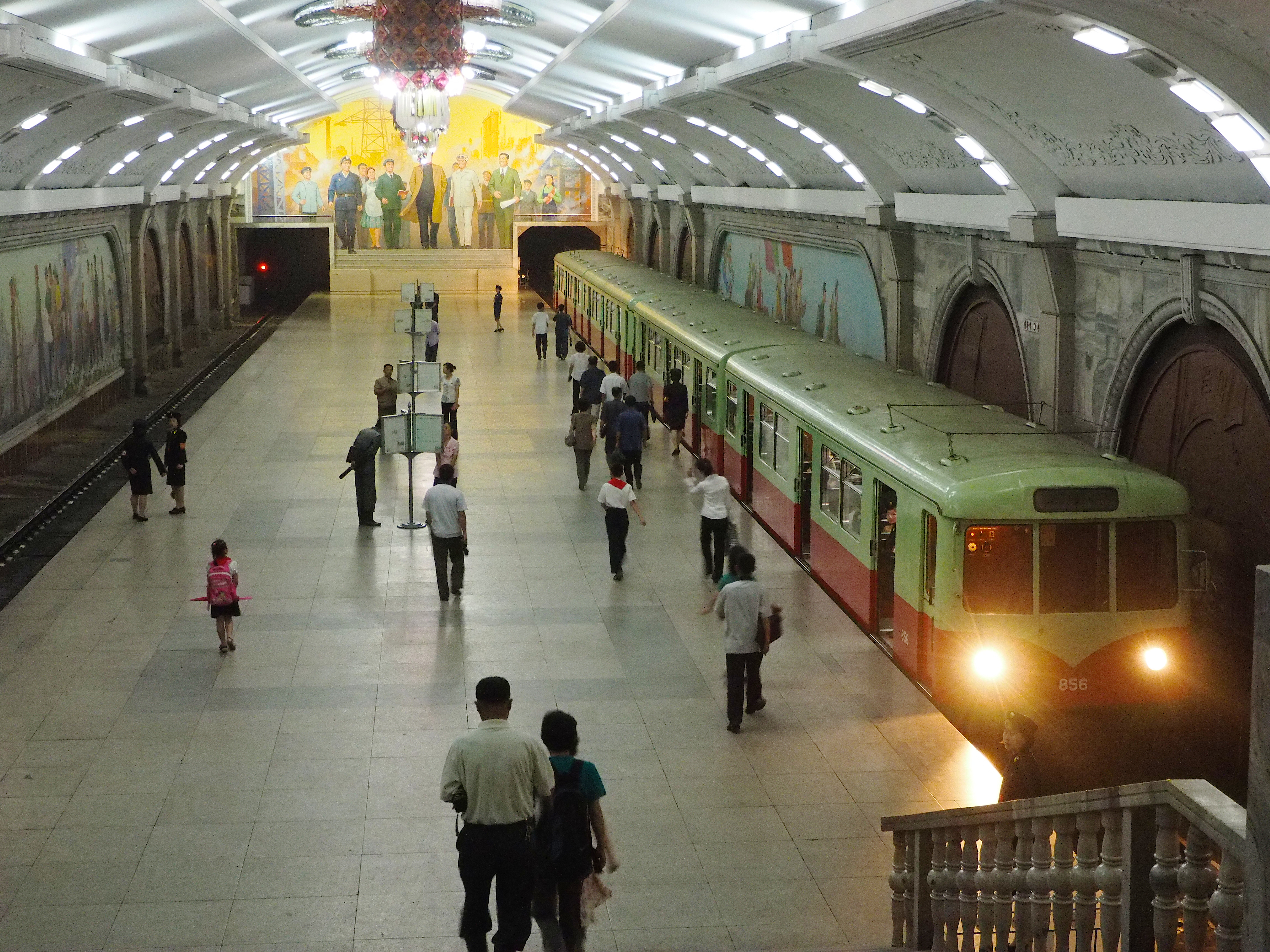 Pyongyang Metro